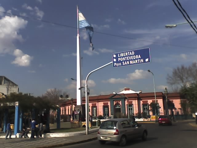 Plazoleta del Mástil, Merlo, Provincia de Buenos Aires.